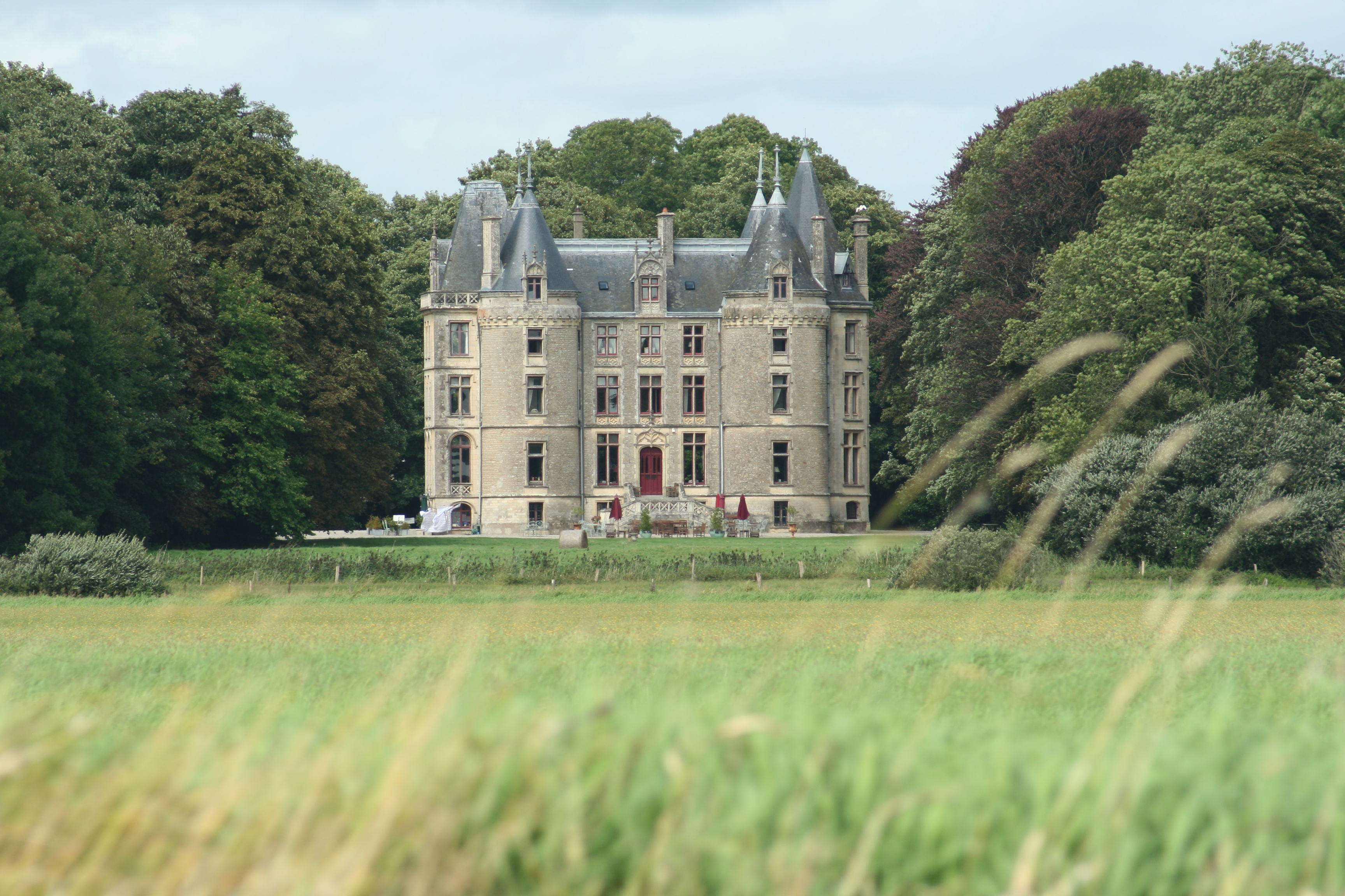 Chateau de l'Isle-Marie, Picauville